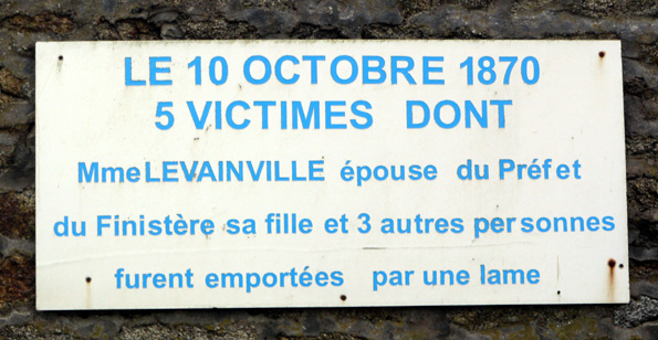 Pancarte affichée près des rochers de St Guénolé.